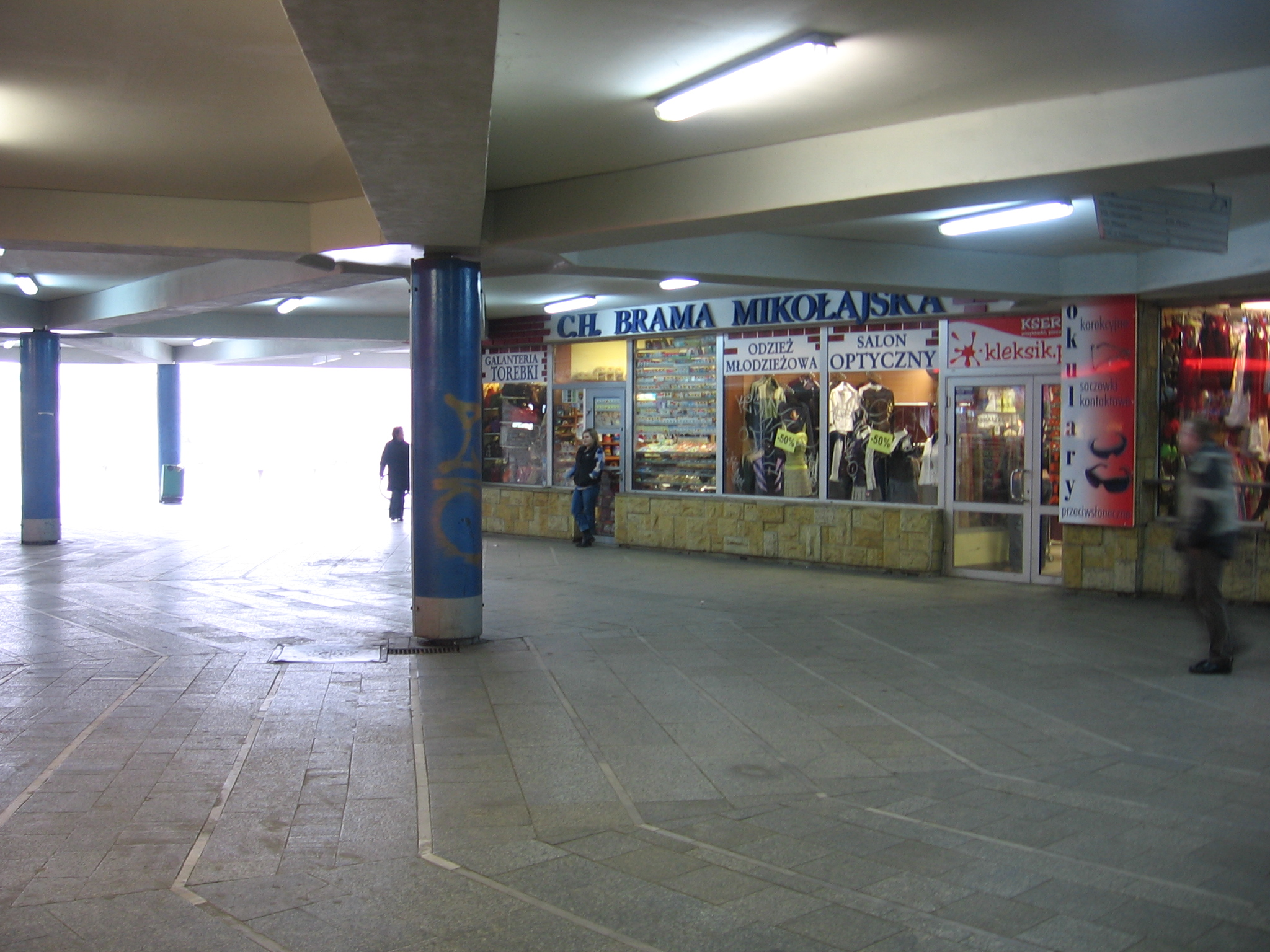 fragment przejścia podziemnego pod pl. Jana Pawła II w Wrocławiu - nazwa sklepu jako jedyny widoczny relikt po stojącej tu niegdyś Bramie Mikołajskiej